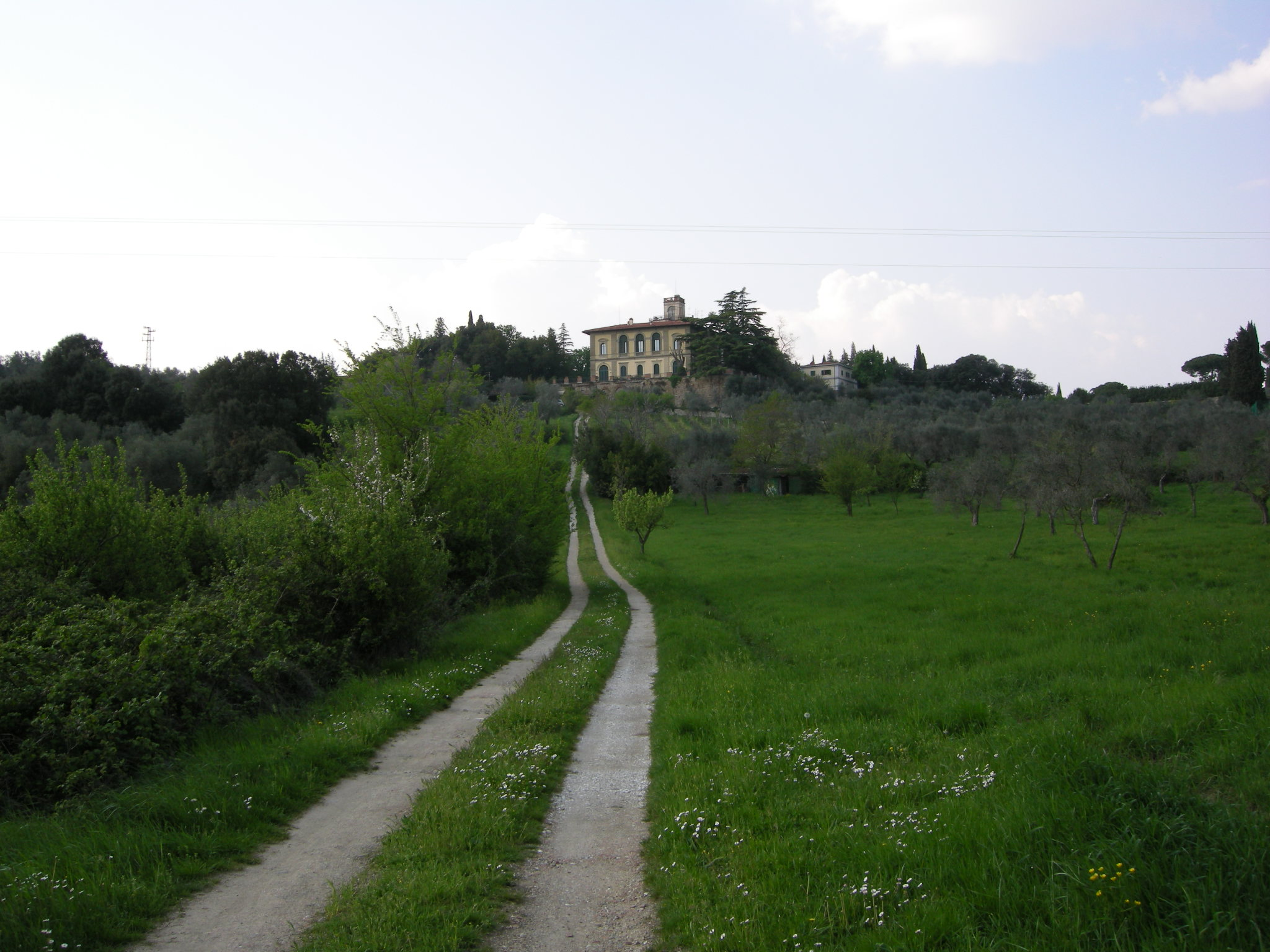 Villa salvini